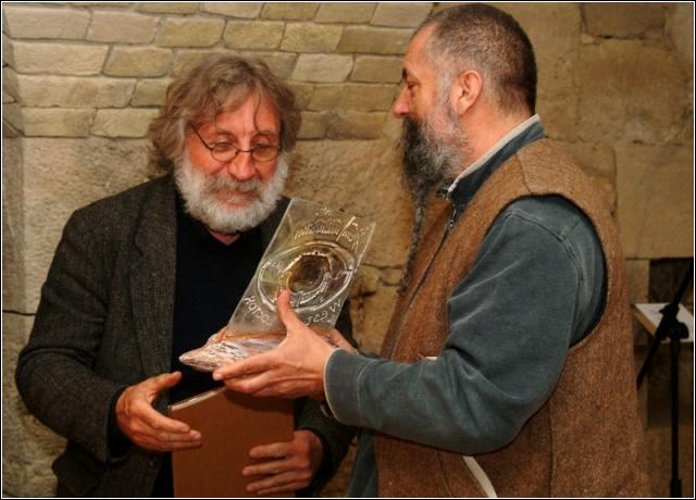 Miquèu Montanaro francia zenész átveszi Párhuzamos Kultúráért díjat Hartyándi Jenőtől, a MEDIAWAVE Alapítvány vezetőjétől